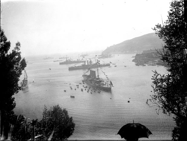 Fonds Trutat - Photographie ancienne Cote : TRU C 2316 Localisation : Fonds ancien (S 30) Original non communicable Titre : La flotte : bateau amiral Italien, Villefranche-sur-Mer, 26 avril 1909 Auteur : Trutat, Eugène Rôle de l’auteur : Photographe Lieu de création : Villefranche-sur-Mer (Alpes-Maritimes) Date de création : 1909 Mesures : : 9 x 12 cm Observations : Note manuscrite de Trutat : " Villefranche-sur-mer, la flotte : bateau amiral italien, 26 avril 1909, Goerz, Sigma ". Mot(s)-clé(s) : -- Mer -- Vu d'en haut -- Bord de mer -- Bateau -- Italien -- Drapeau -- Marine -- Armée -- Manifestation militaire -- Revue -- Manifestation officielle -- Fête -- Président de la République -- Arbre -- Ombrelle -- Villefranche-sur-Mer (Alpes-Maritimes) -- Alpes-Maritimes (Provence-Alpes-Côte d'Azur) -- Provence-Alpes-Côte d'Azur (France) -- Méditerranée, Mer (France) -- 20e siècle, 1e quart Médium : Photographies -- Négatifs sur plaque de verre -- Noir et blanc -- Paysages maritimes -- Goerz -- Sigma Bibliothèque de Toulouse. Domaine public